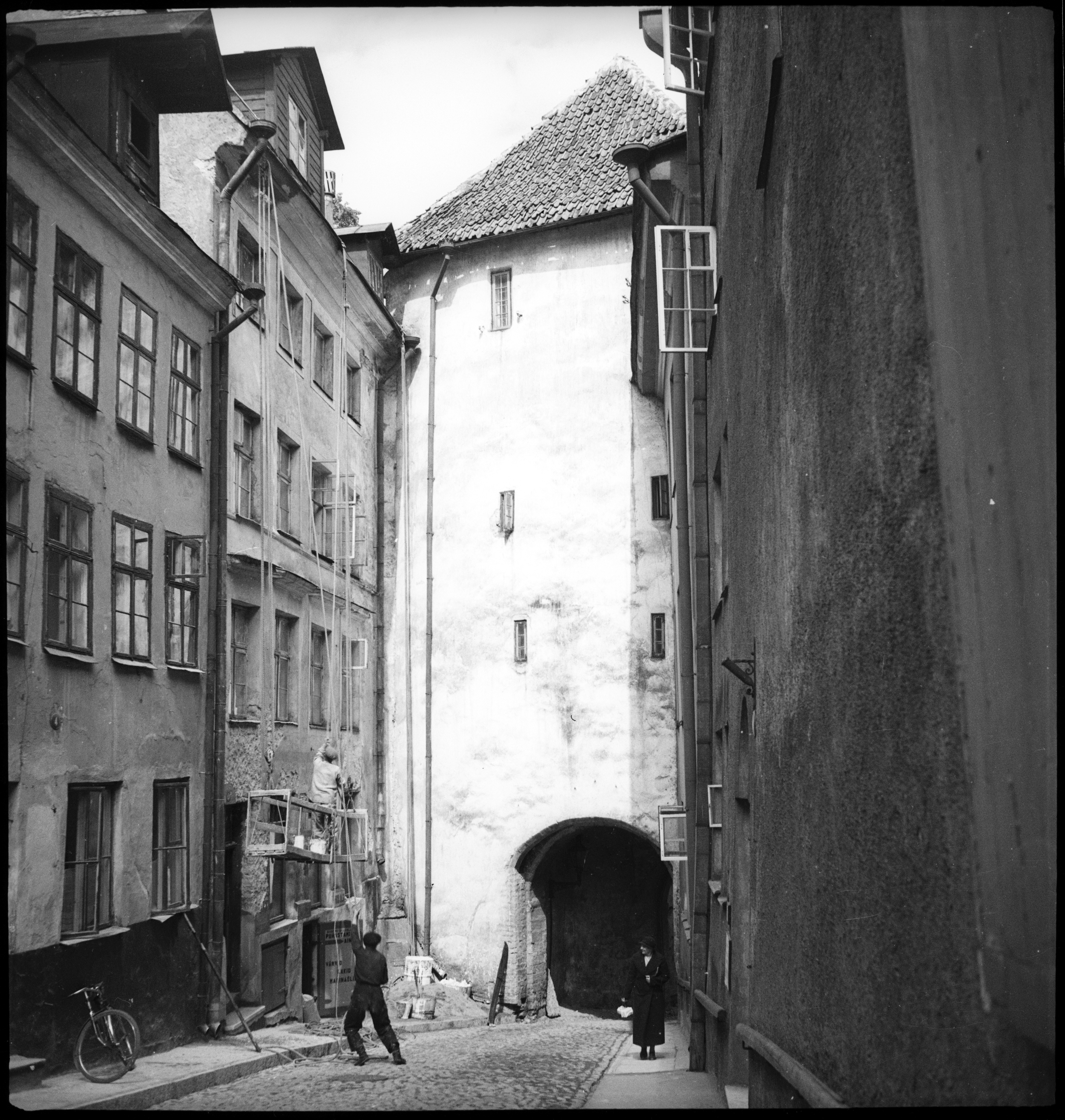 Estland, Tallinn (Reval): Strasse; Strasse mit Gebäuden